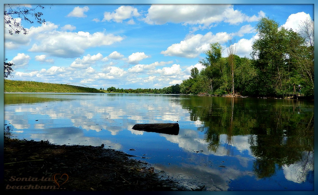 Petit coin d'une grande beauté pour les amoureux de la Nature...